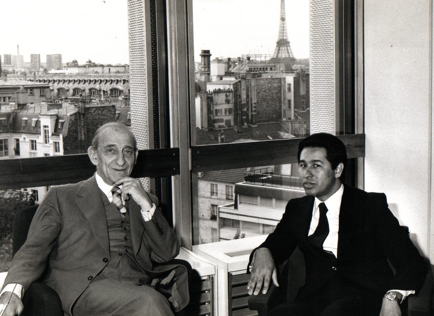 Raymond Aron e Ignacio Quintana en la oficina de Raymond, Paris